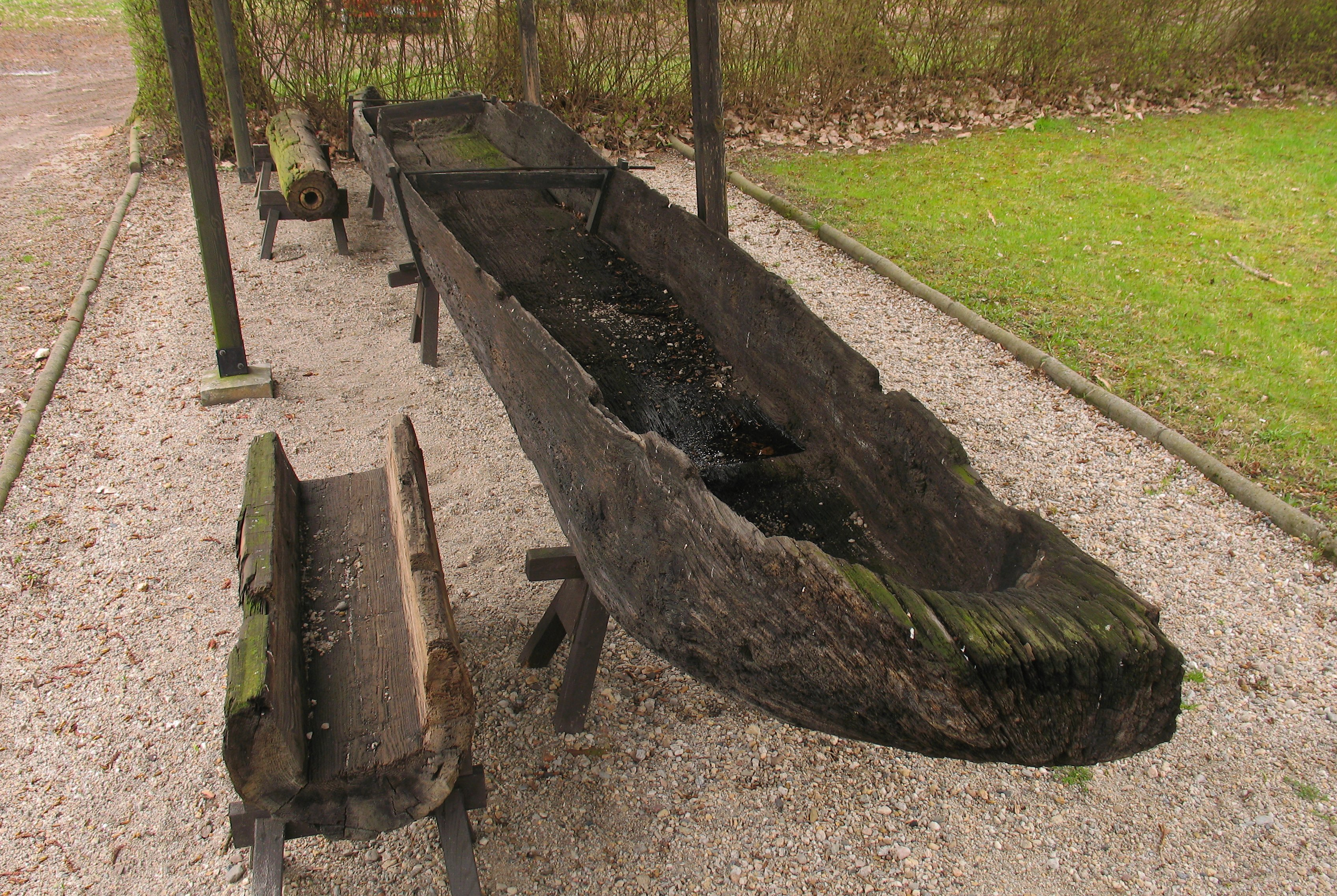 a 10th century dugout boat found in the Oder river in Poland. Presented in the Świdnica museum near Zielona Góra Łódź dłubanka z Xw. znaleziona w Odrze. Muzeum w Świdnicy (woj. lubuskie)